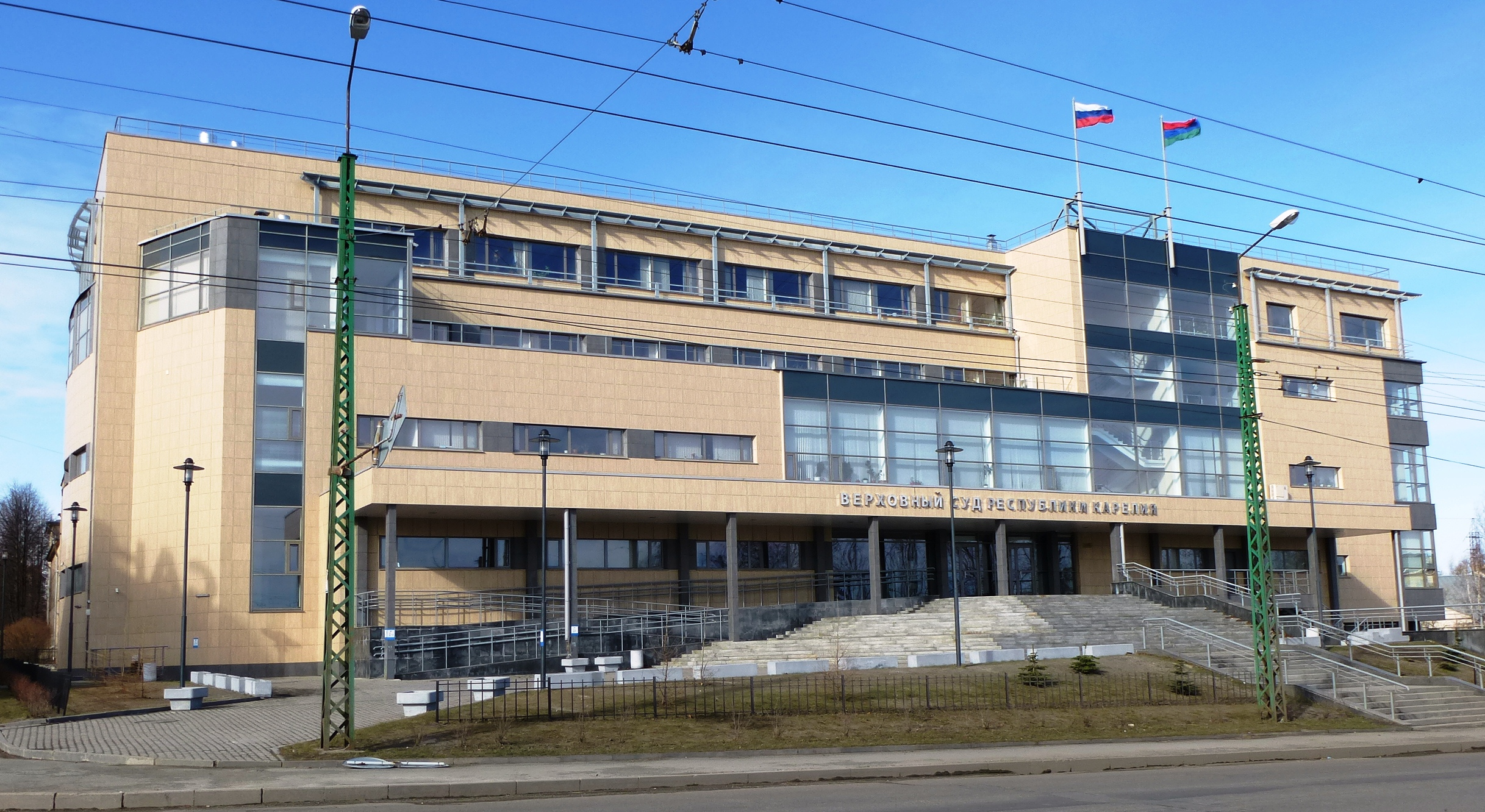 Здание Верховного суда Республики Карелия в Петрозаводске на ул.Кирова